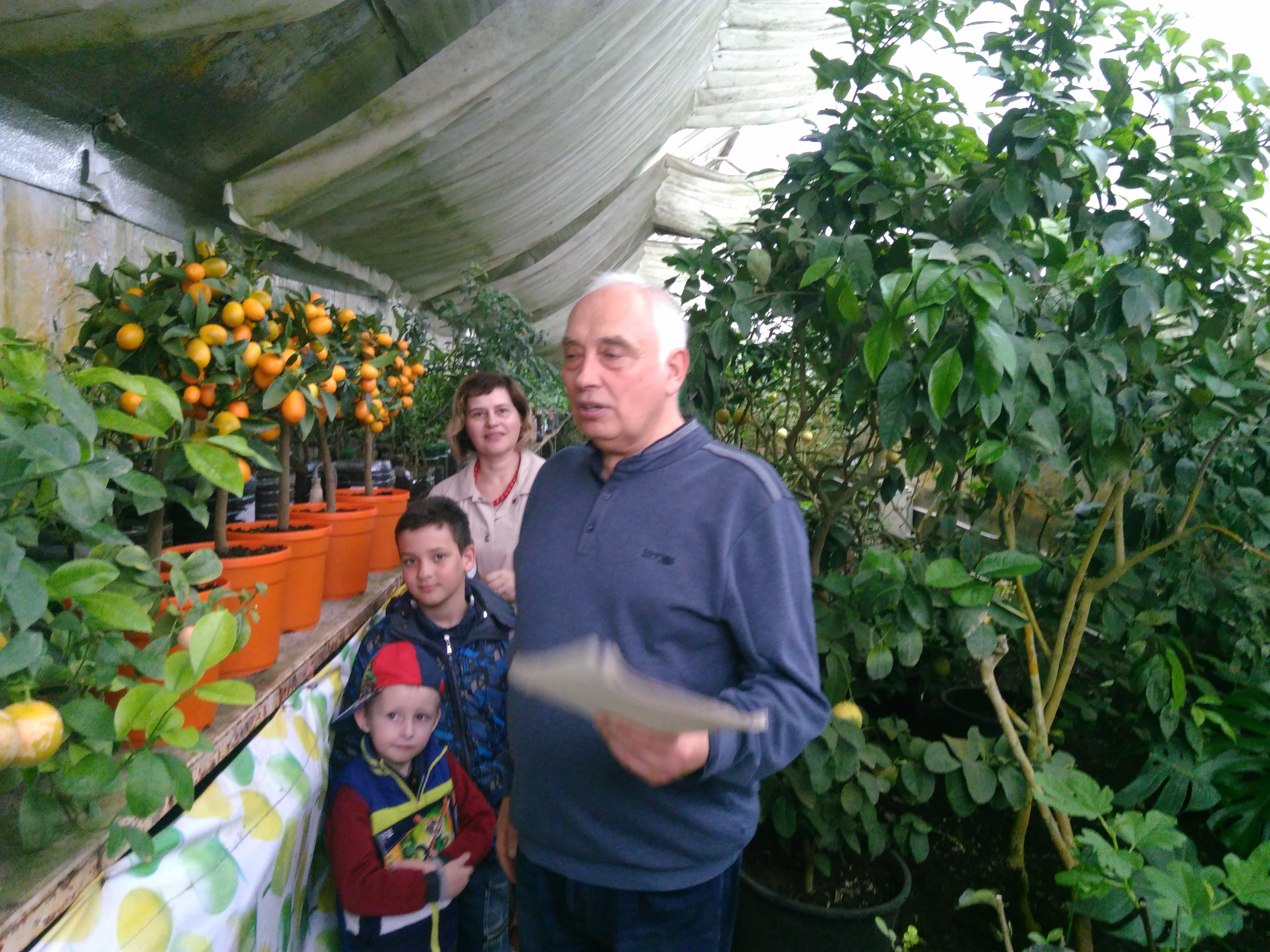 Анатолій Патій проводить екскурсію по своїй Банановій фермі